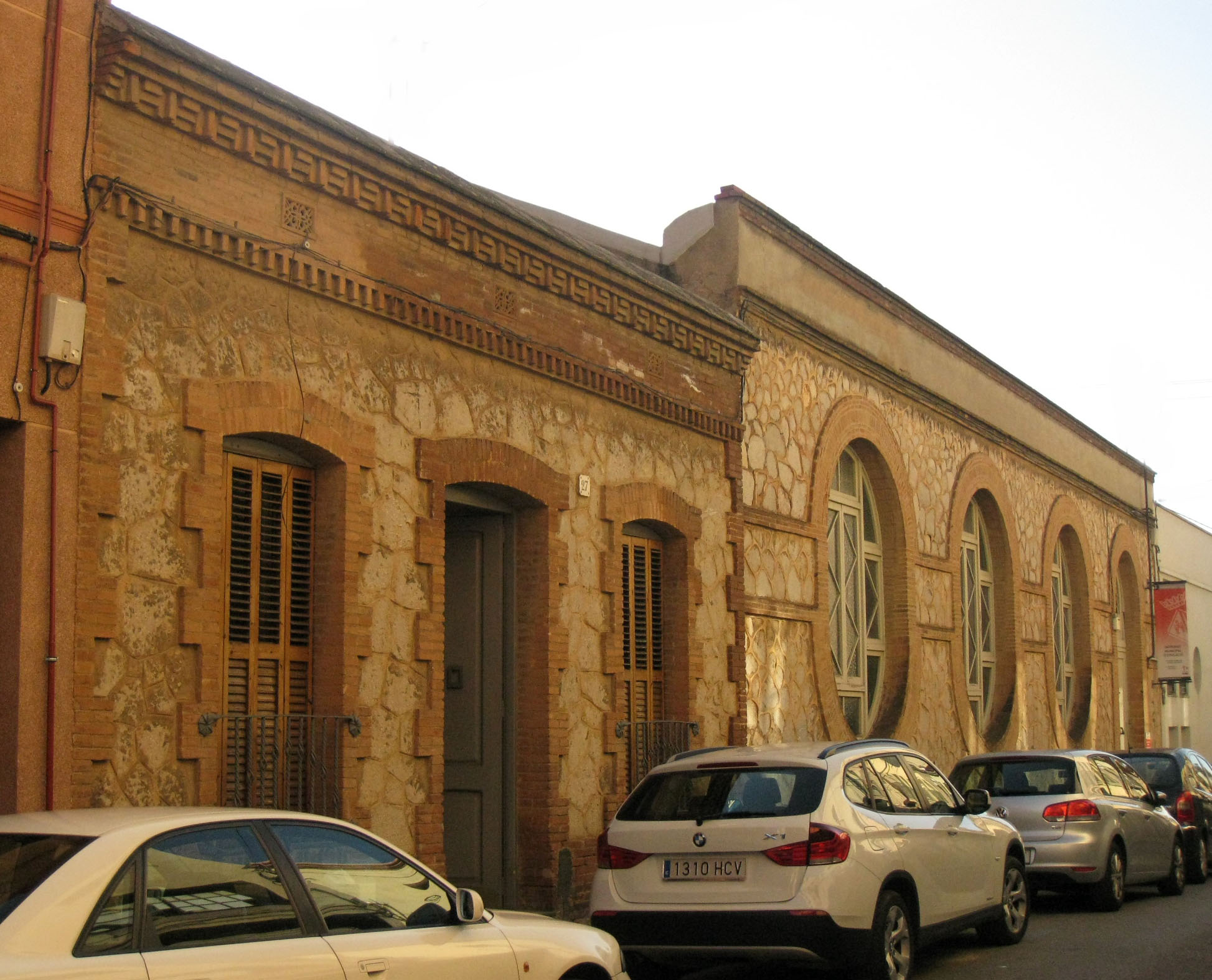 Escola de Donya Magdalena (a la dreta) i casa de la mestra, al carrer de Sant Isidre (Terrassa). Edifici modernista de Josep M. Coll i Bacardí del 1912.